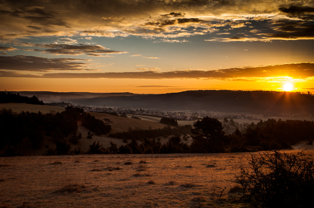 NP Altmühltal: Wenn der Morgen erwacht zeigt sich Landershofen im Altmühltal im goldenen Licht der Sonne